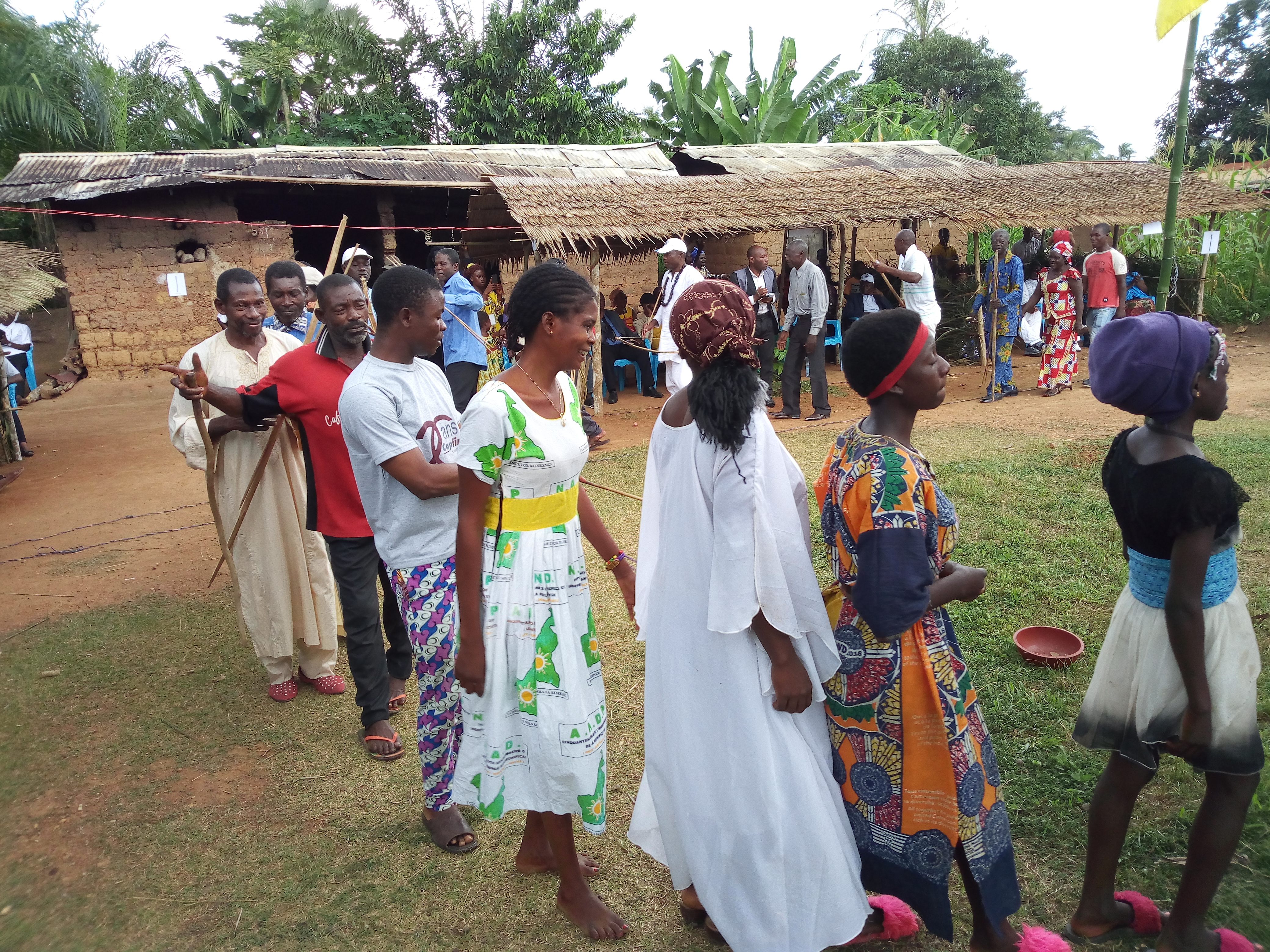 Mankana est une danse uki pour célébrer et honorer des personnes. This is an image with the theme "Play" from: Cameroon